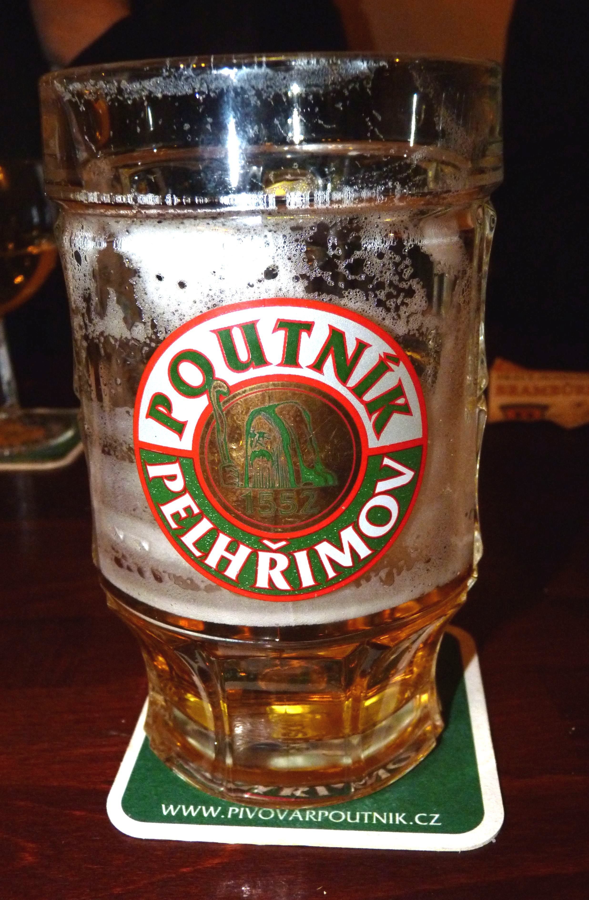 Pivo Poutník, U Poutníka, Brno